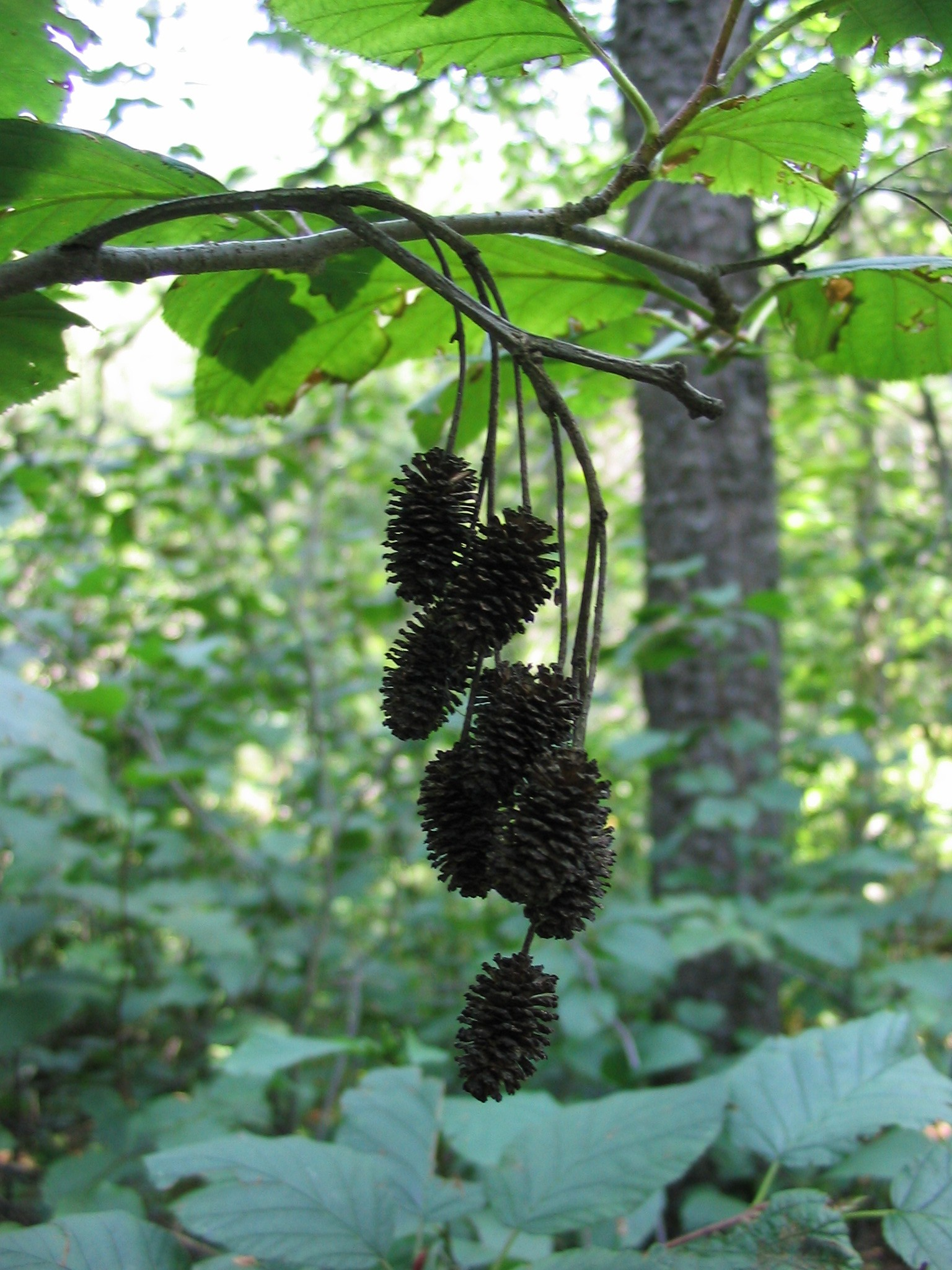 Alnus viridis 1-eheep